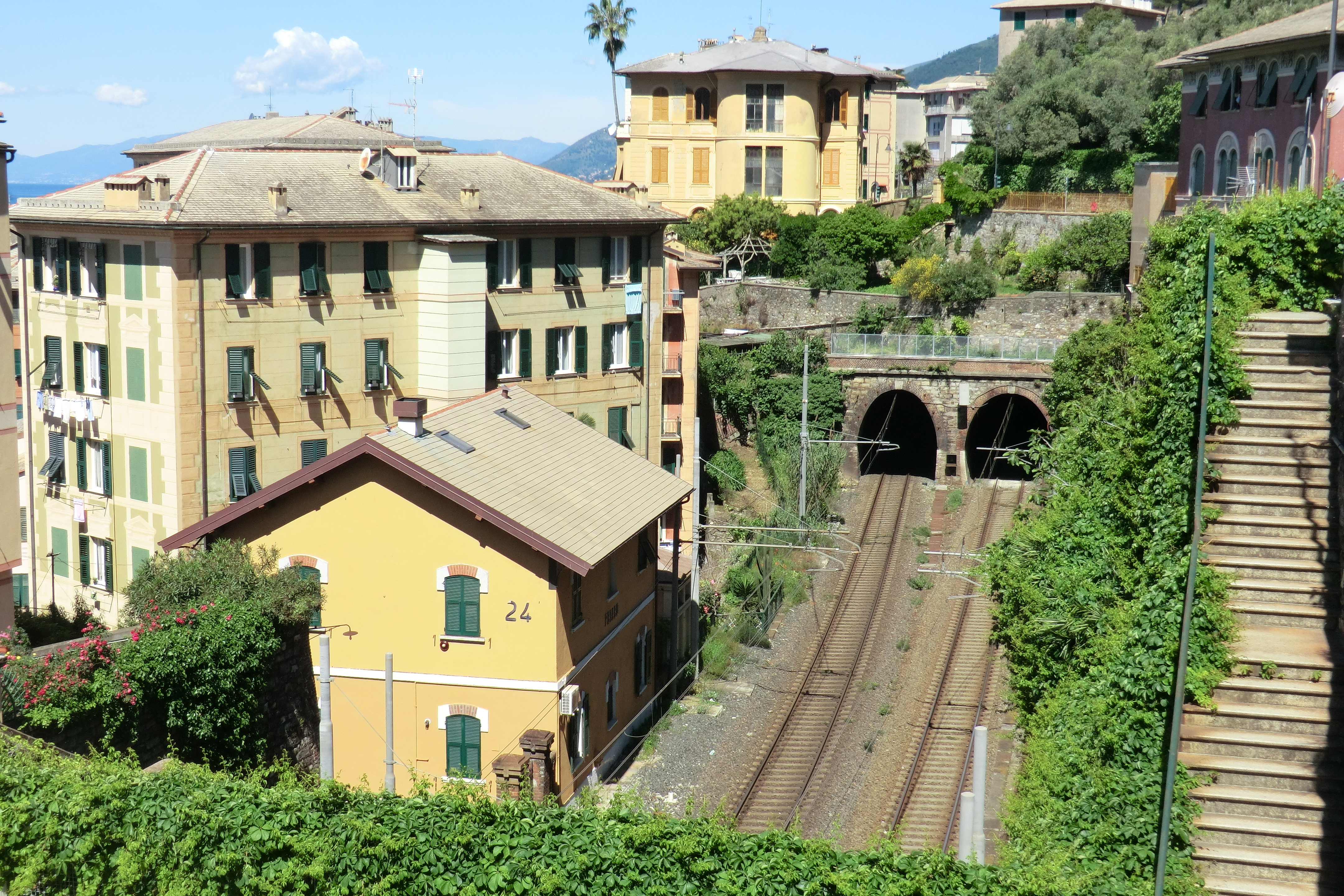 Ex stazione ferroviaria di Priaro.